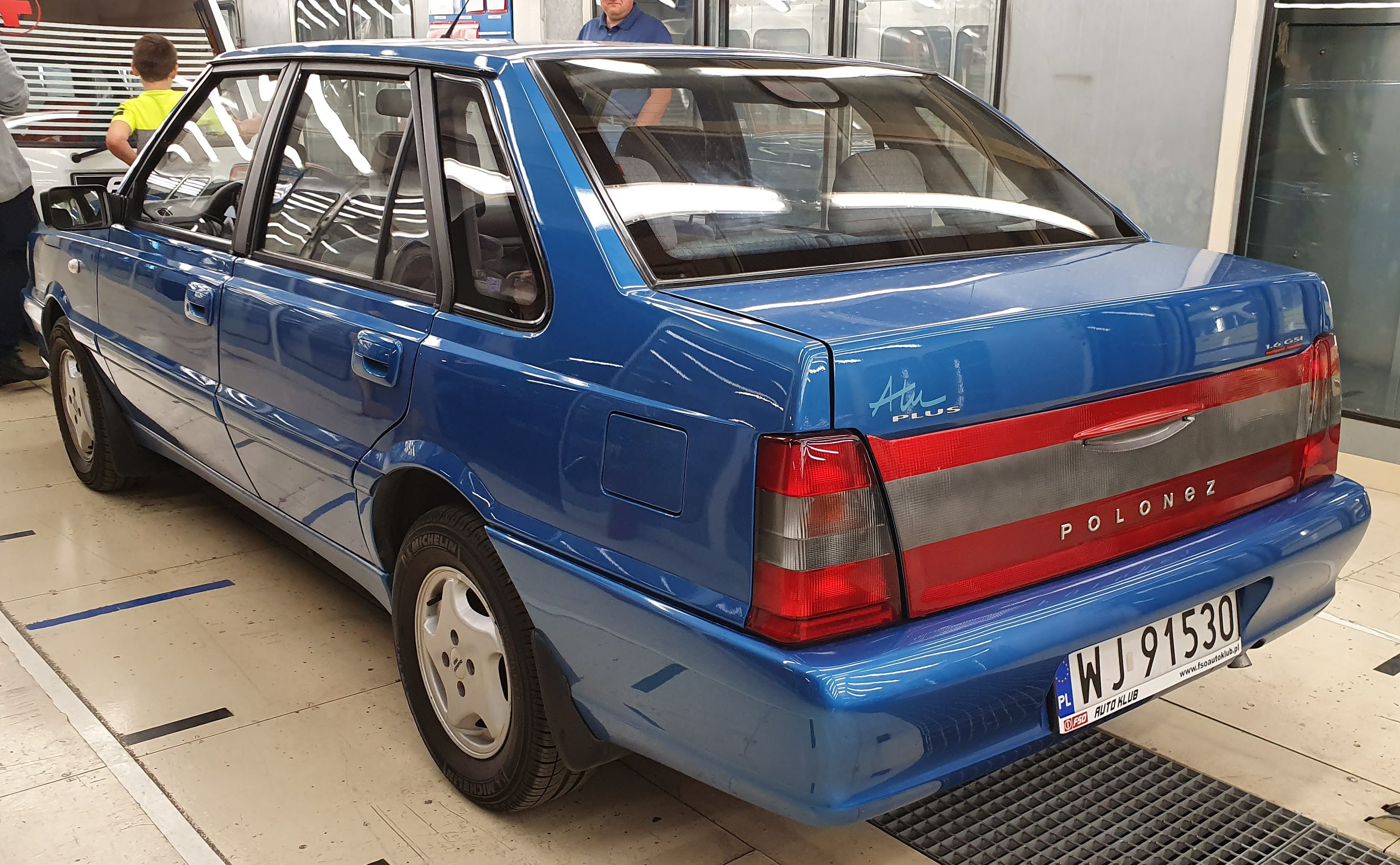 Daewoo-FSO Polonez Atu Plus 1.6 GSI